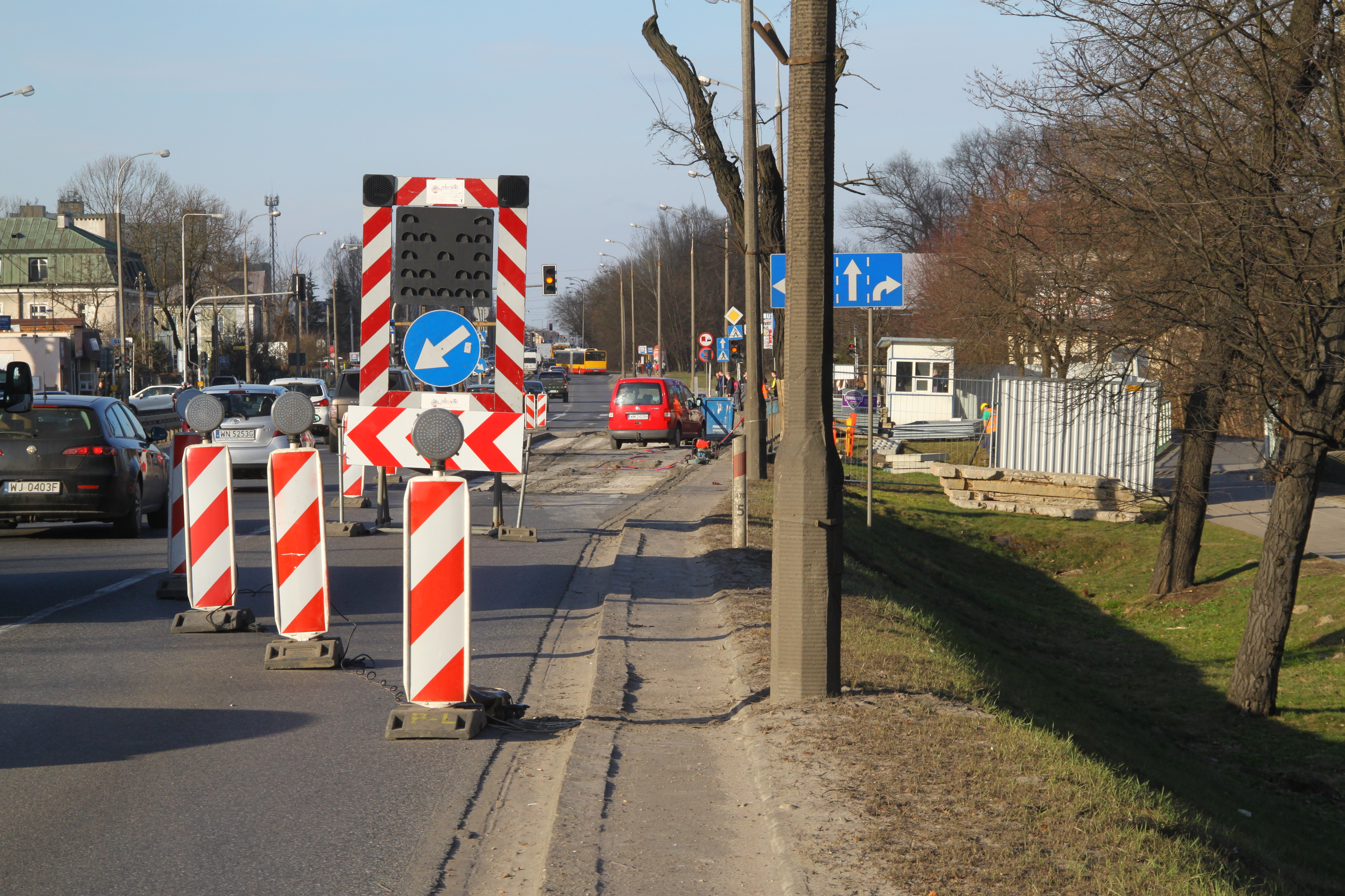 Remont mostu drogi wojewódzkiej nr 629 (Al. Piłsudskiego) nad rzeką Długą.